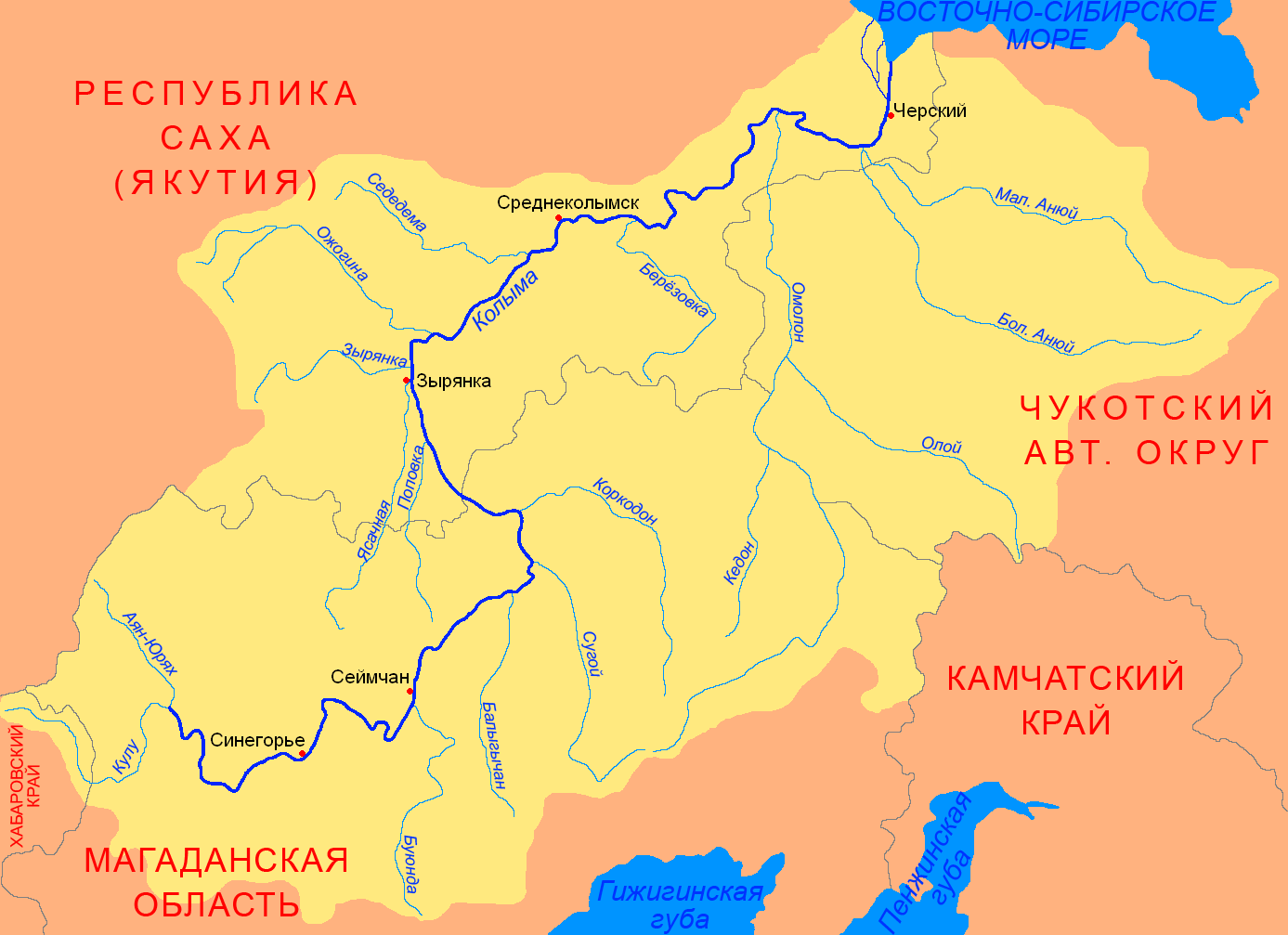 Схема бассейна реки Колыма